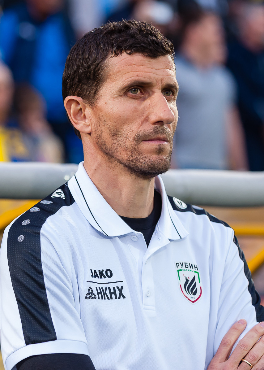 «Ростов» - «Рубин»